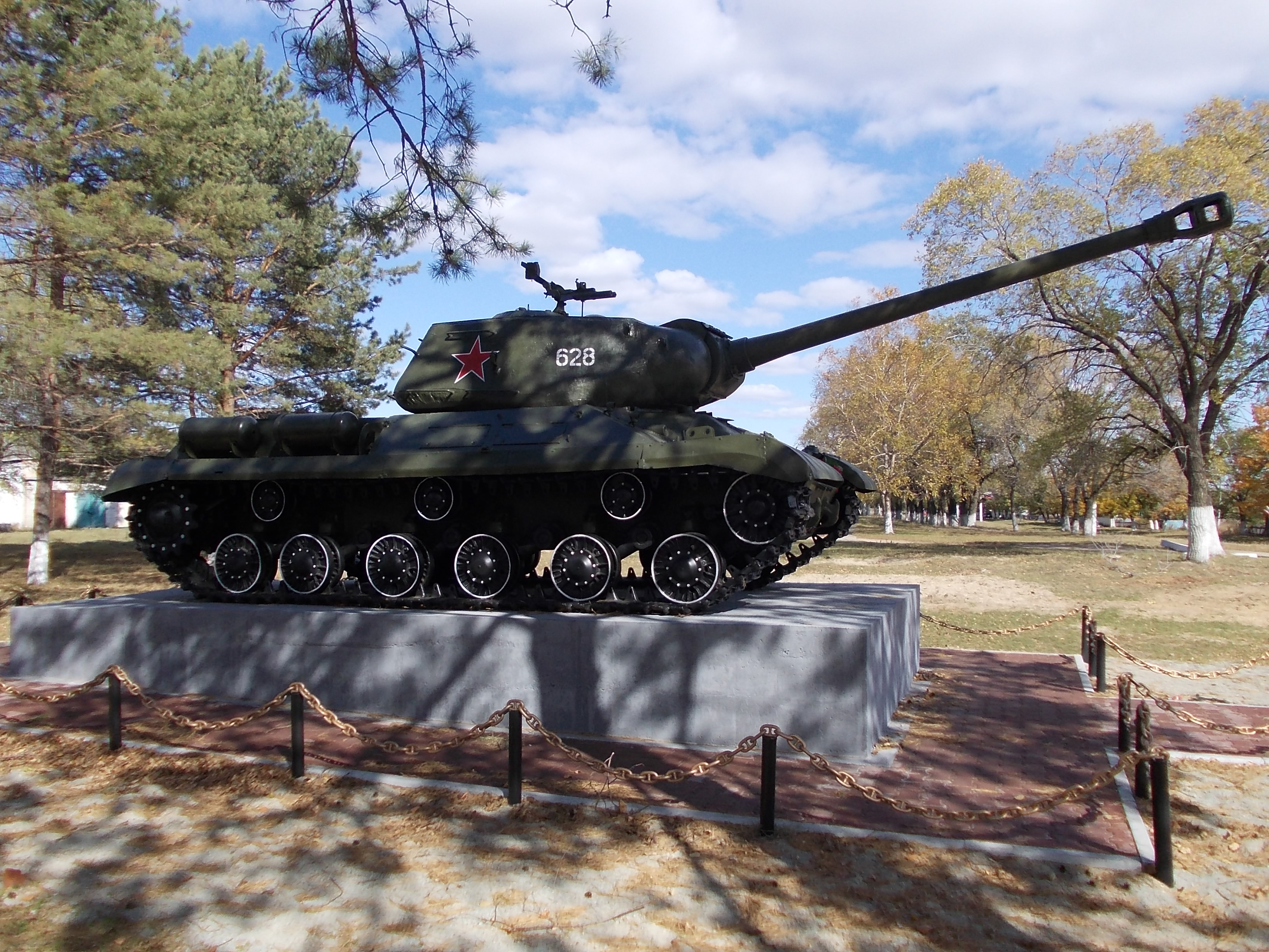 Памятник был открыт в честь очередной годовщины окончания русско-японской войны в с. Кукелево ЕАО. Танк был выкопан из земли, подвергнут пескоструйной обработке и отреставрирован.